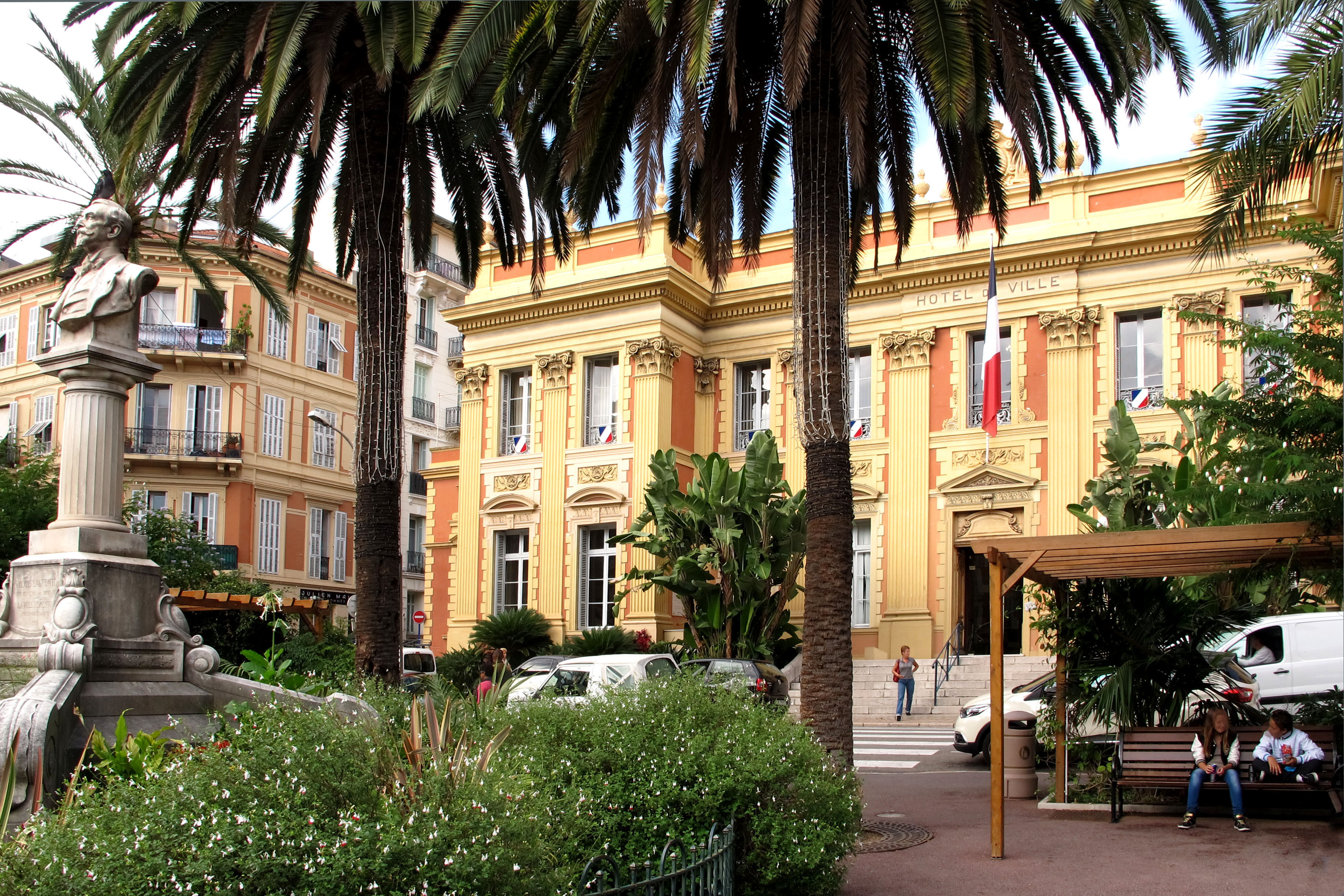 Hôtel de ville de Menton, PACA, France